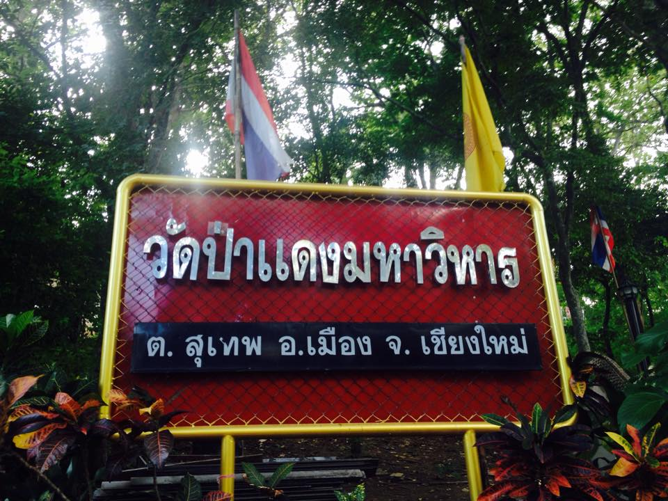 วัดป่าแดงมหาวิหาร